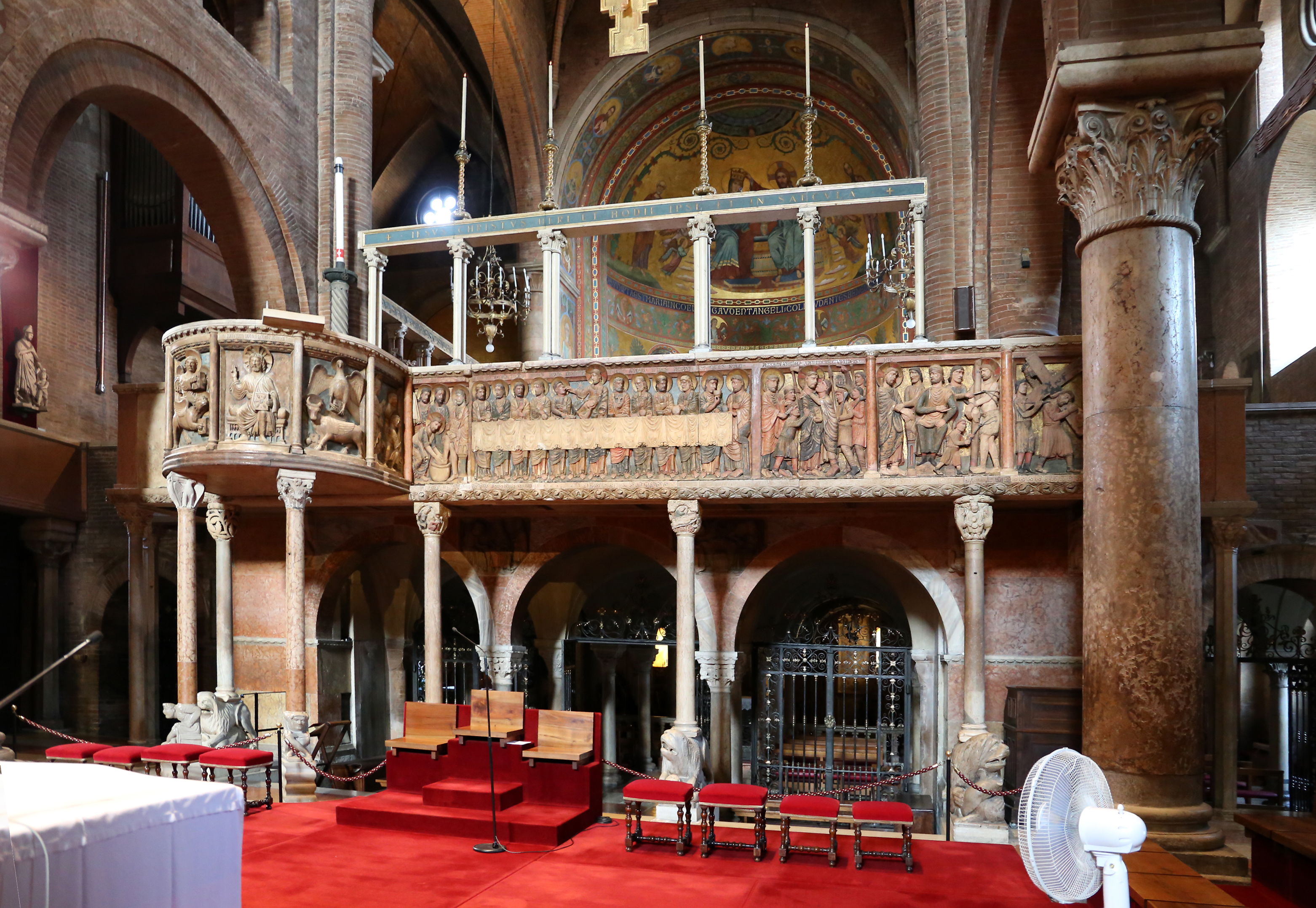 Piazza Grande (Modena) This is a photo of a monument which is part of cultural heritage of Italy.